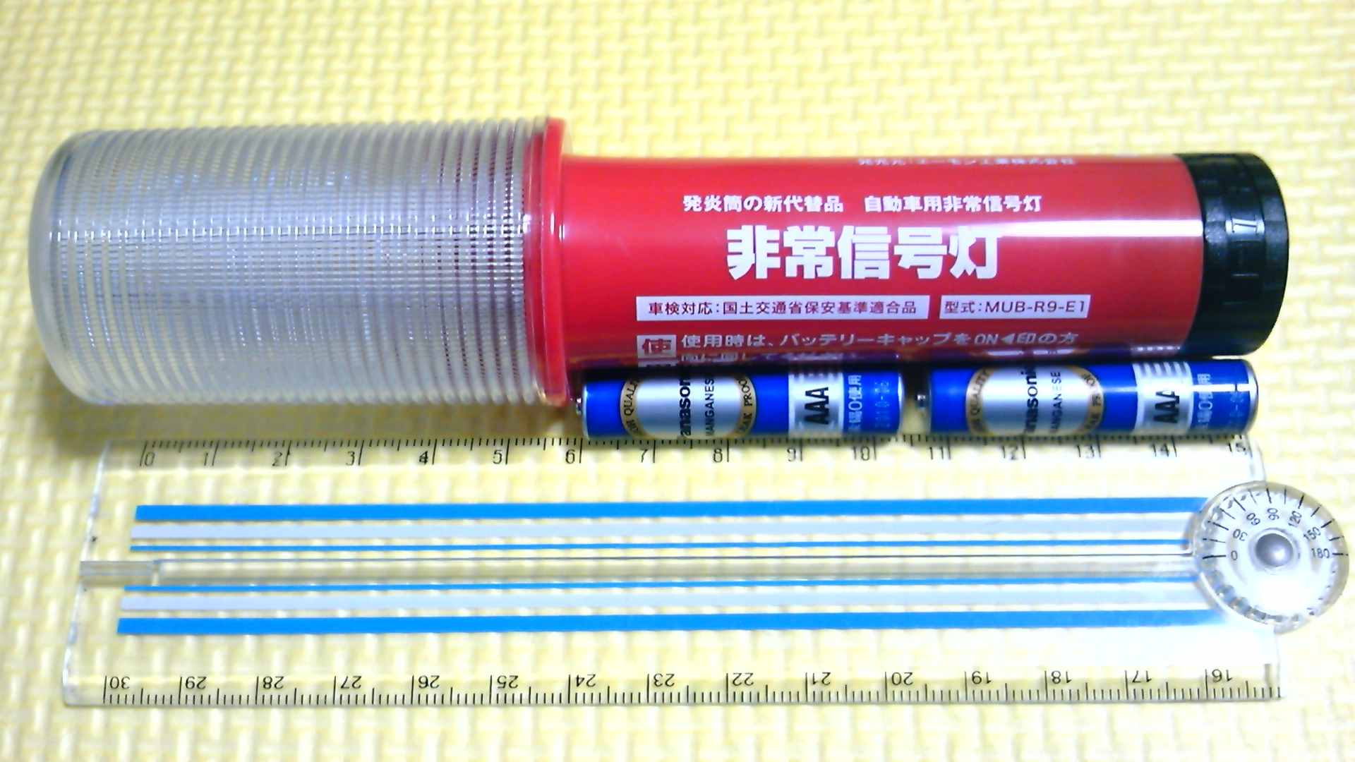 非常信号灯 エーモン工業株式会社 ITEM No.6723 車検対応品（国土交通省保安基準適合品） 使用電池 単4電池2本（3V） 連続使用時間 約20時間（新品単4マンガン電池使用時） 使用温度範囲 -10℃～+45℃ 保存温度範囲 -20℃～+70℃ 光源 高輝度赤色LED 9個使用 本体重量 90g 車載発煙筒の代替品。本体底のマグネット部分をひねると、赤色LEDが点滅する。点滅以外の点灯パターンは無い。液漏れと予備電池の用意に留意すれば良い製品として活かせるだろう。